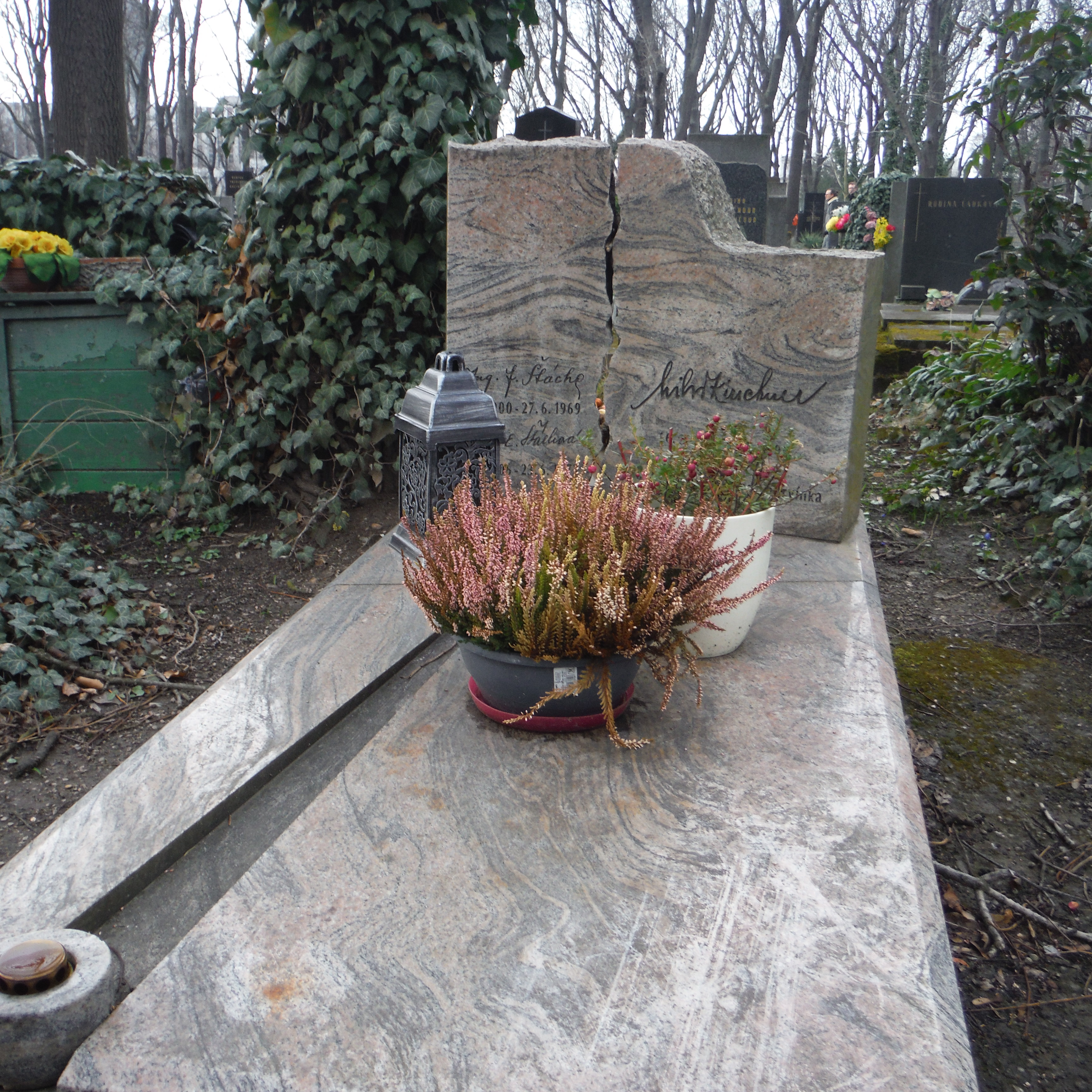 hrob